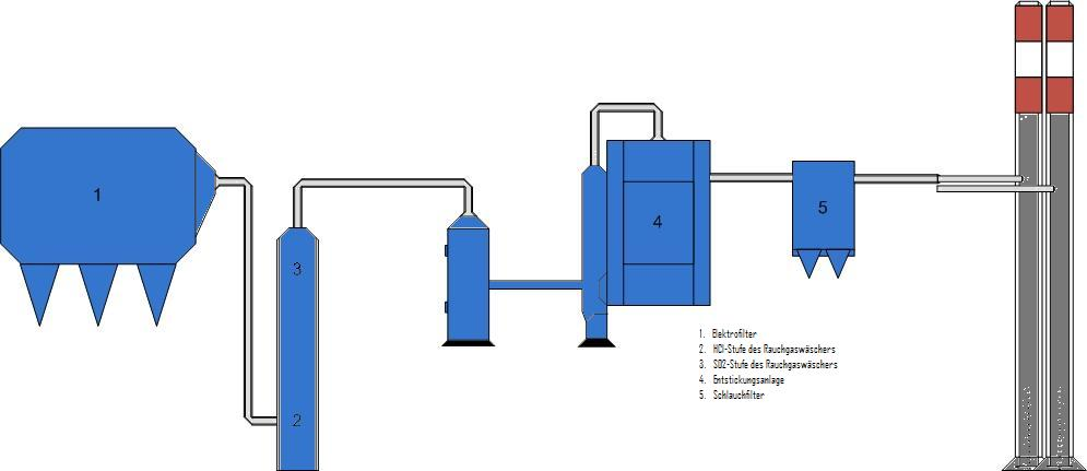 Aufbau einer fünfstufigen Rauchgasreinigung